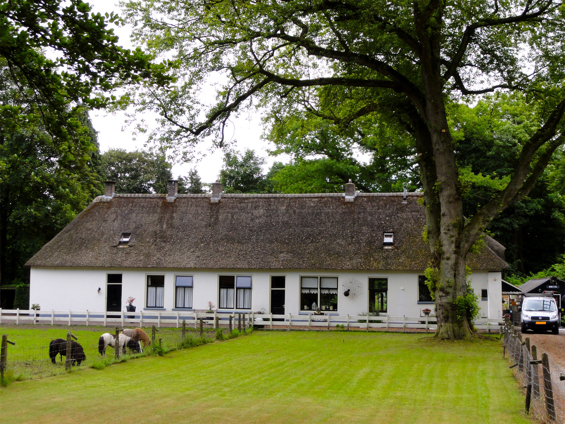 Voormalige school - Maatschappij van Weldadigheid - Oranjelaan 6 Wilhelminaoord - rijksmonument